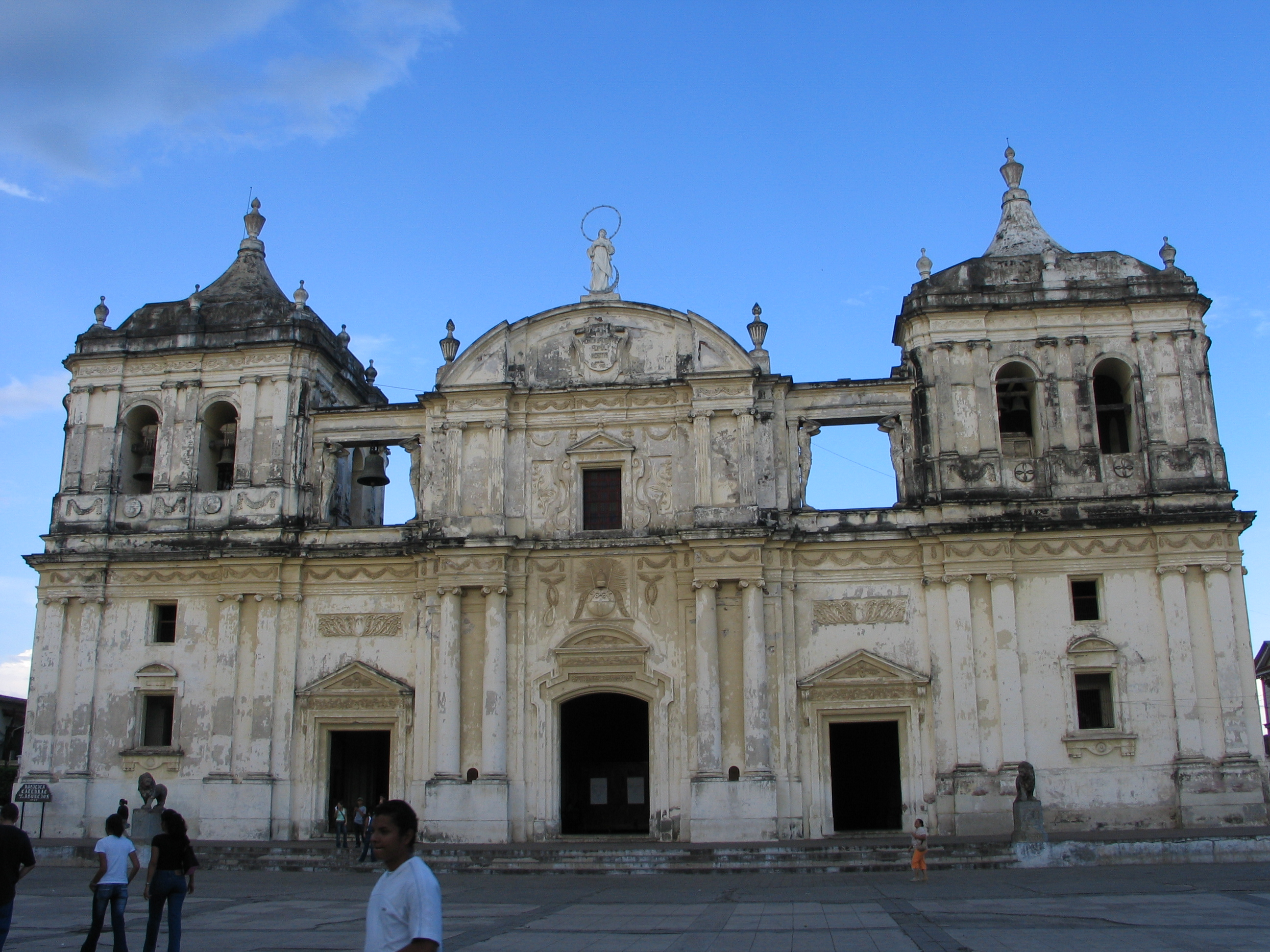 Basilica de la Asunción in Léon, Nicaragua.